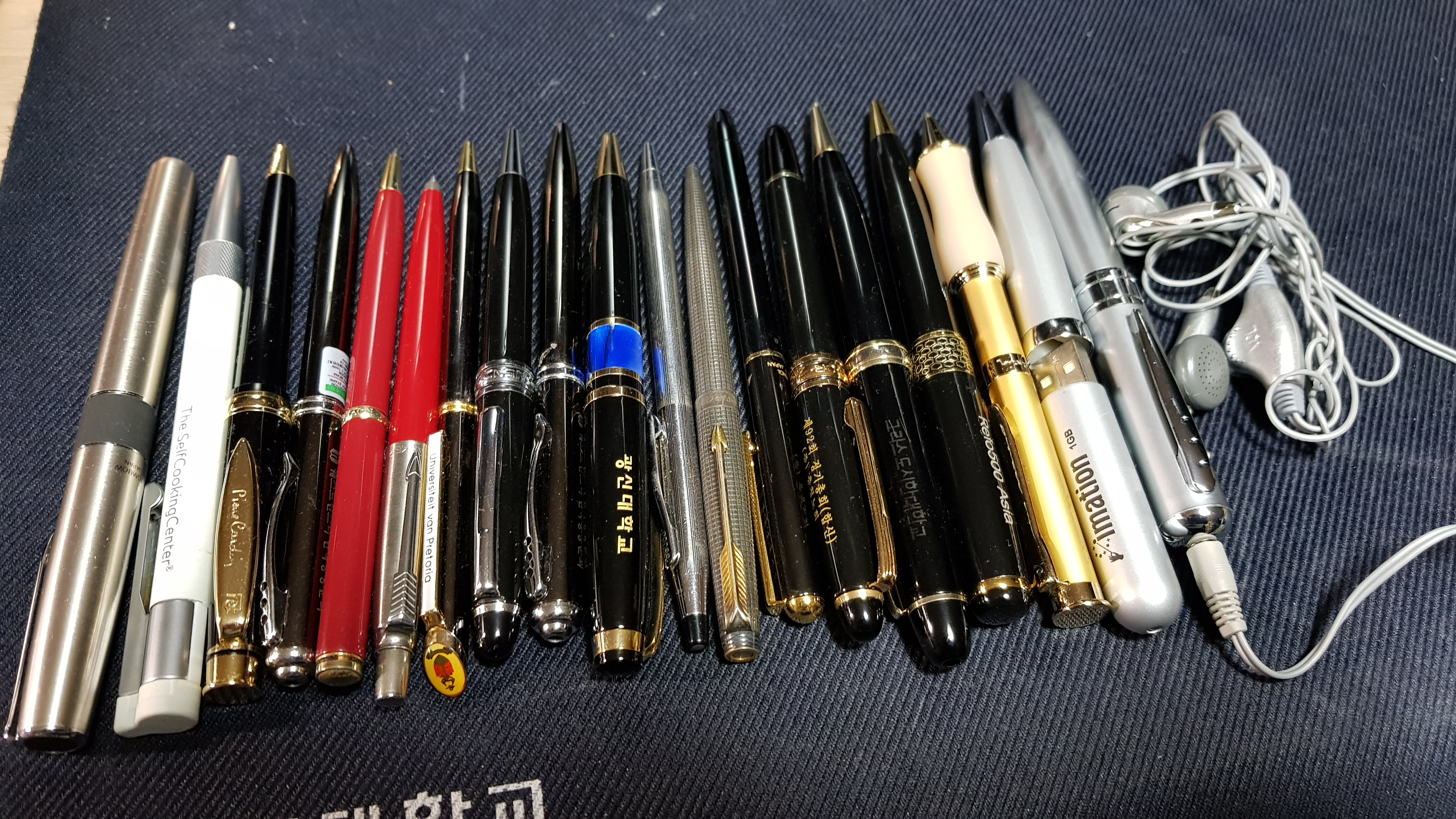 일상에서 자주사용하는 볼펜들 모음